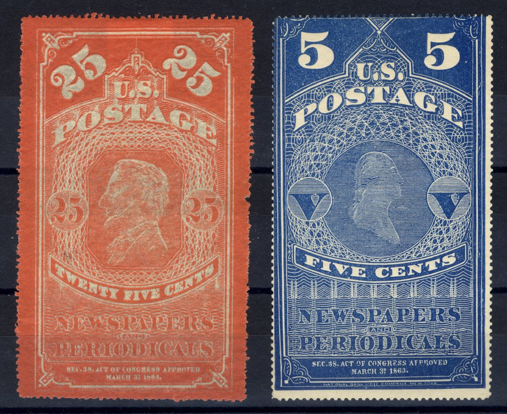 Beispiele für Zeitungsmarken des us Postal Service